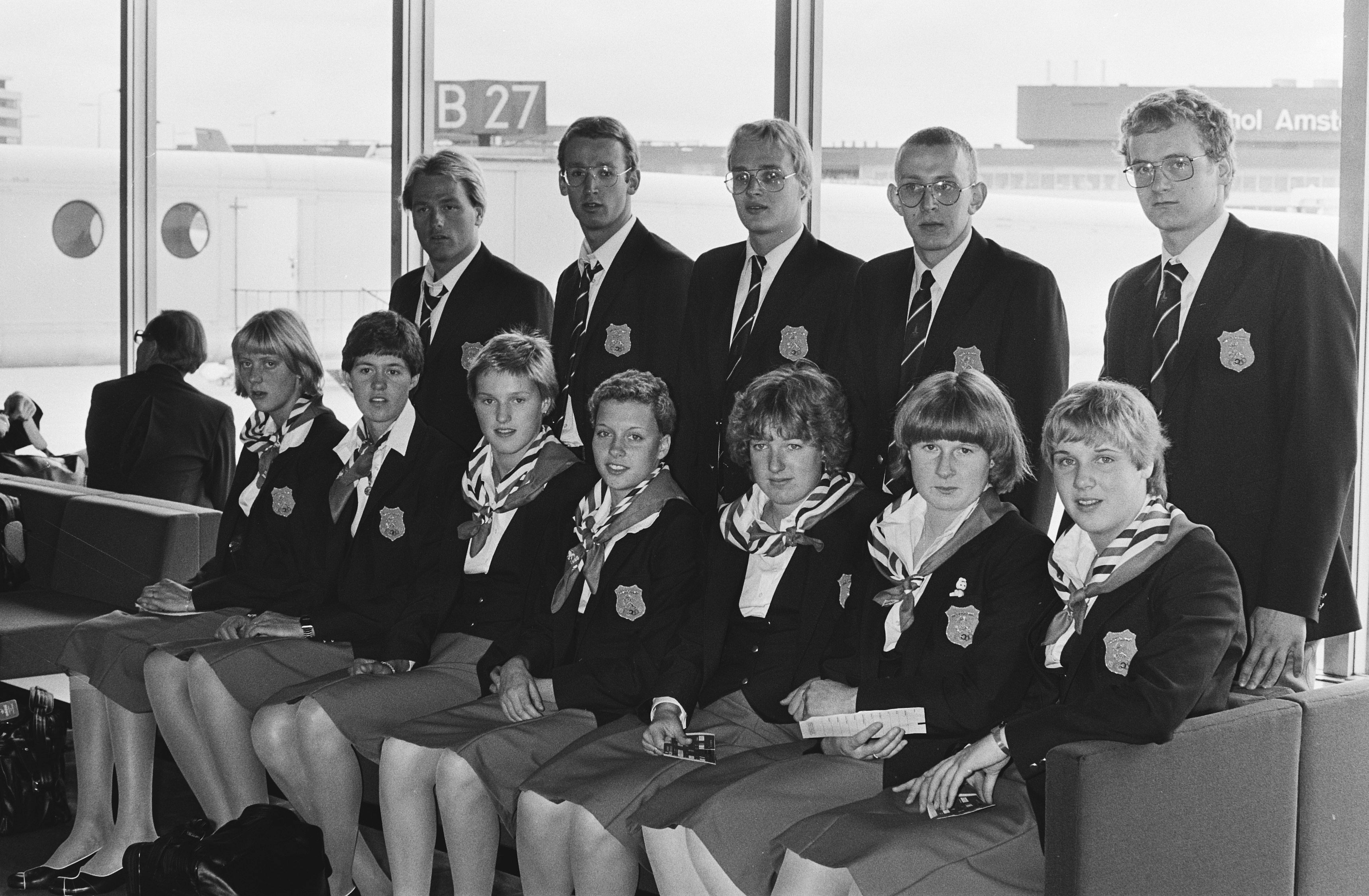 Vertrek van de Olympische zwemploeg van Schiphol naar de Olympische zomerspelen te Moskou in 1980: zittend de dames Jolanda de Rover, Monique Bosga, Connie van Bentum, Reggie de Jong, Annelies Maas, Wilma van Velsen, Monique Drost; staand de heren Fred Eefting, Cees Vervoorn, Albert Boonstra, Cees Jan Winkel, Peter Drost